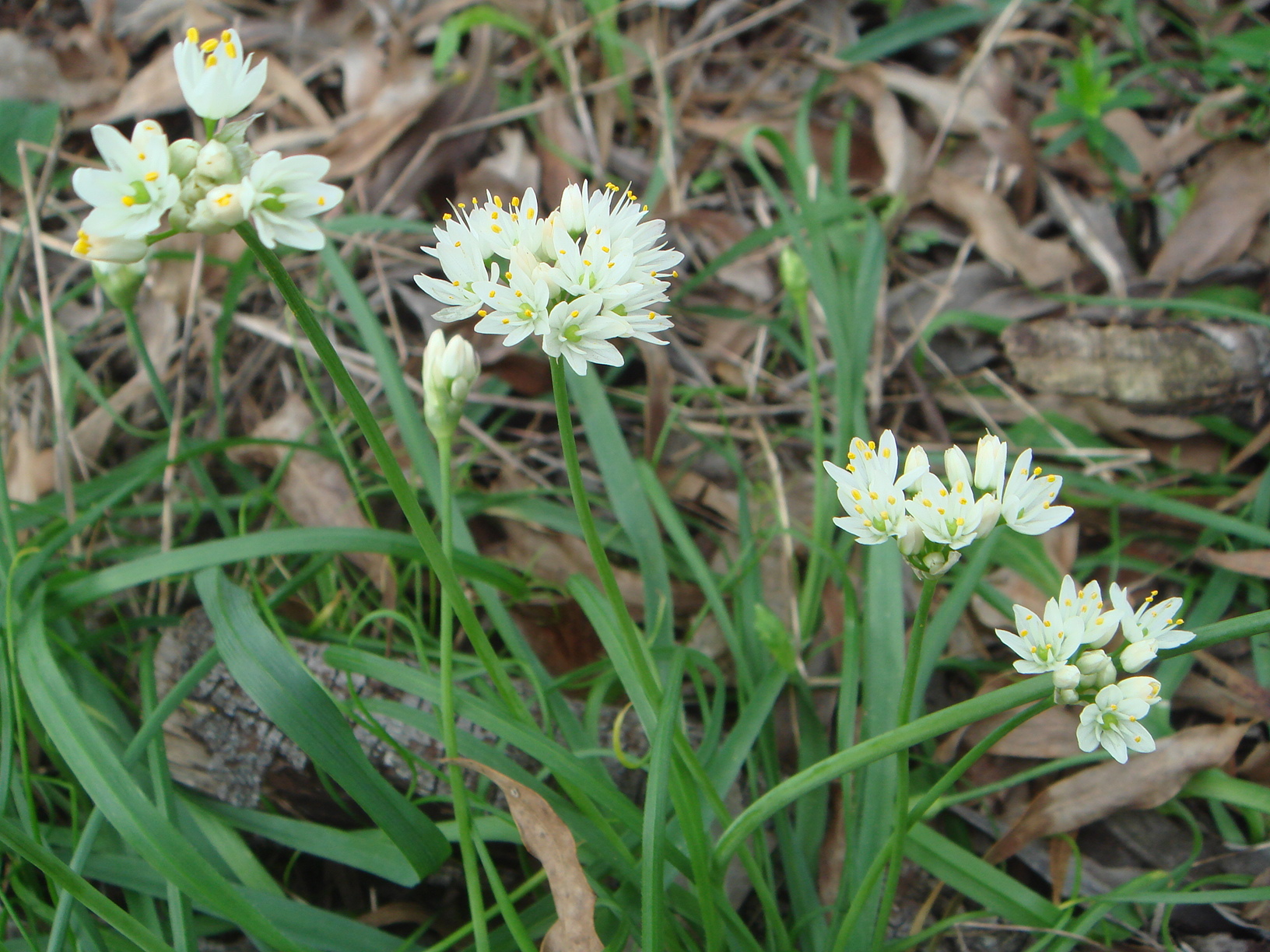 Allium subvillosum, Chiclana (Cádiz) España